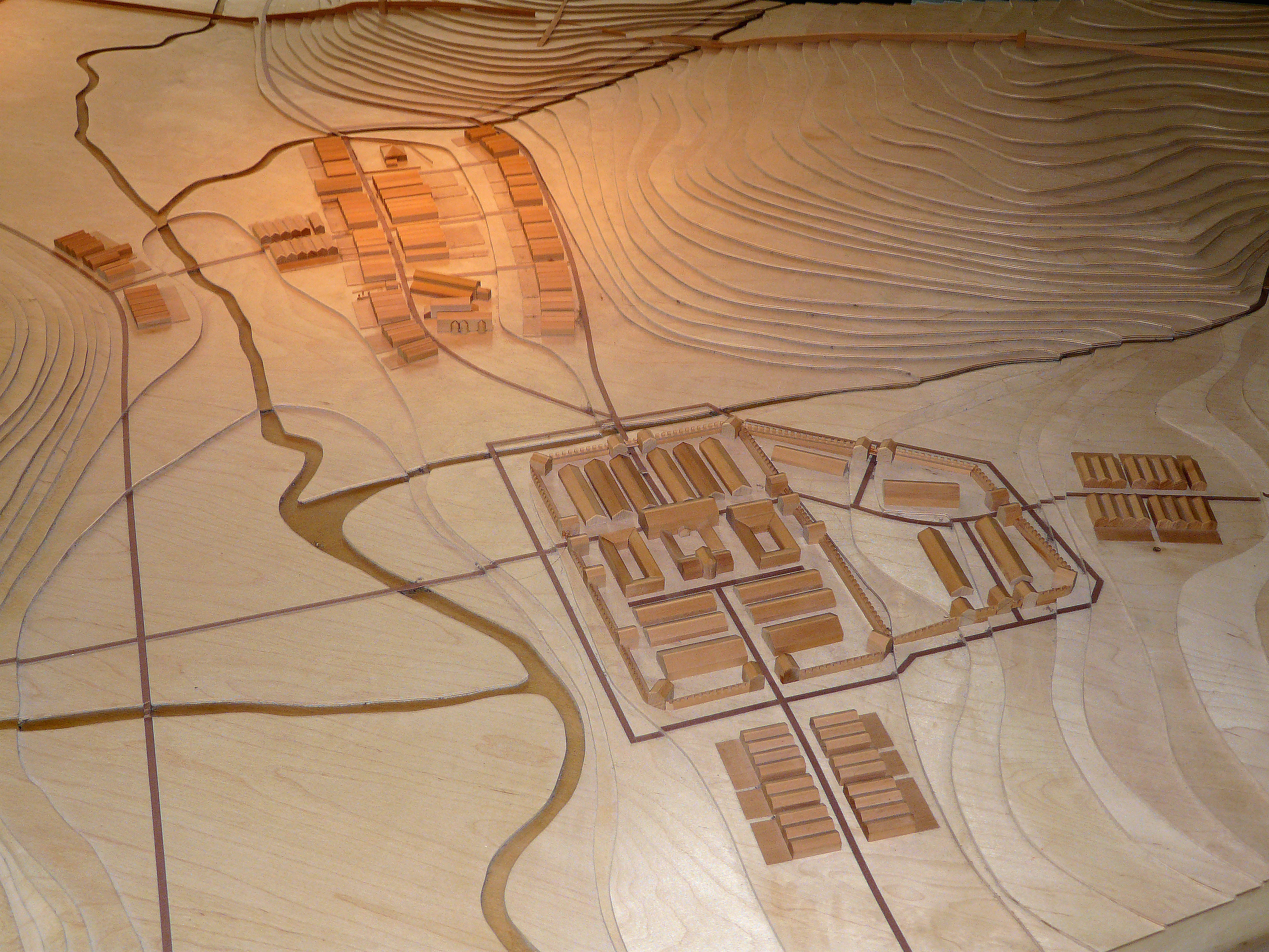 Modell im Ausstellungsraum des Erdgeschosses des Römermuseums Osterburken